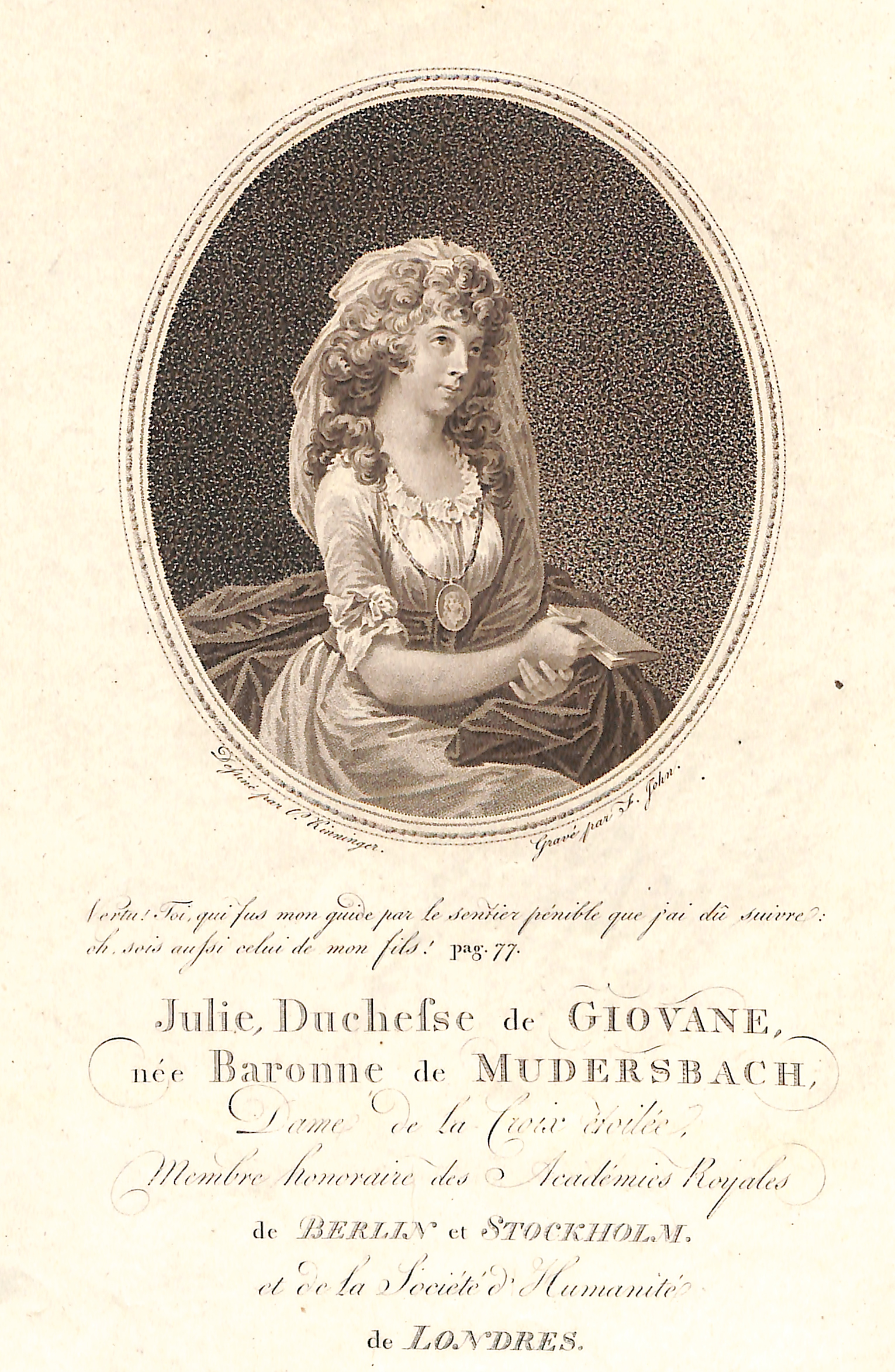 Portrait de Juliane Giovani di Girasole (1766-1805) duchesse née Baronne de Mudersbach